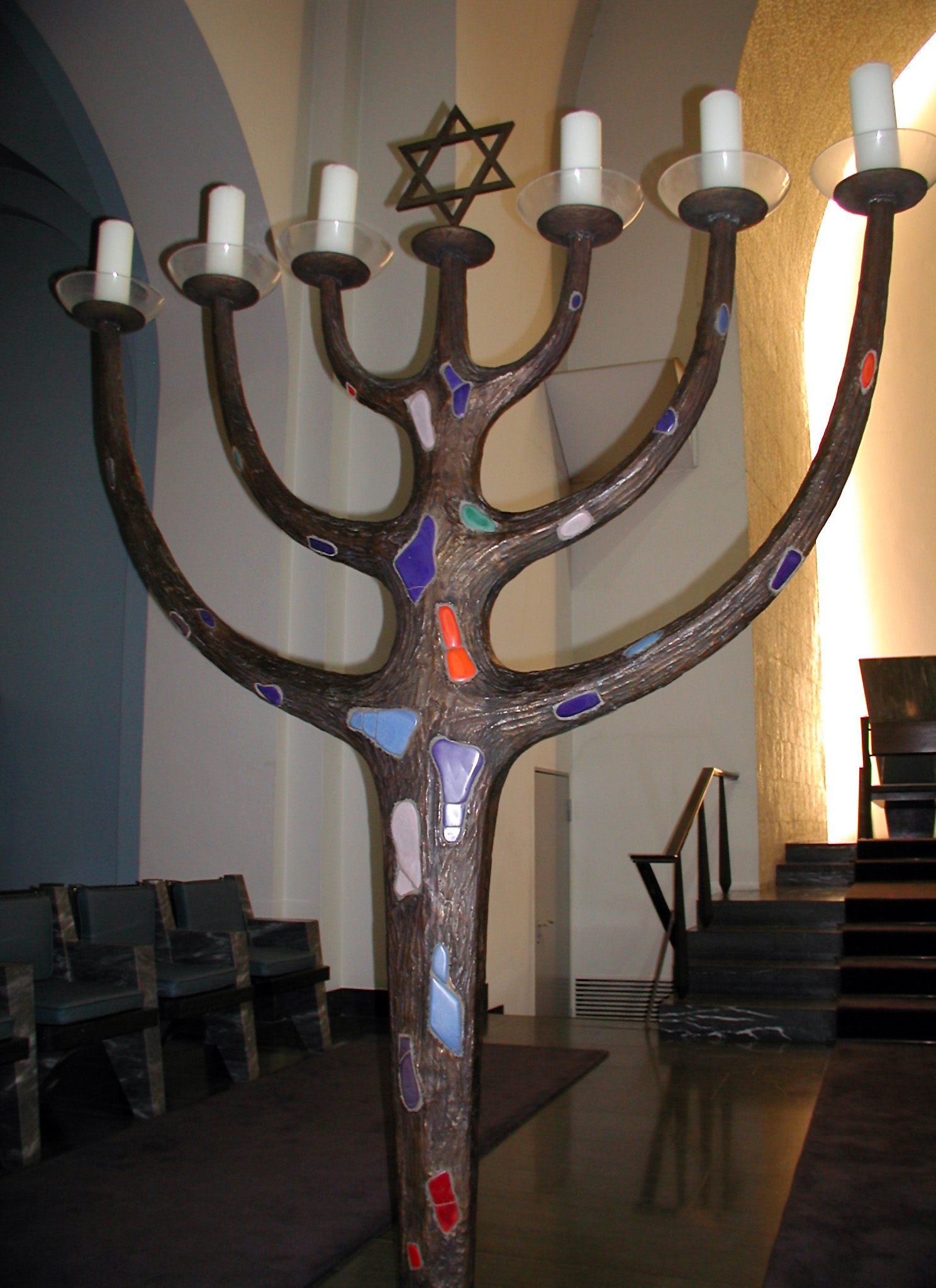 Synagoge Roonstraße Köln, Menora seitlich des Toraschreins